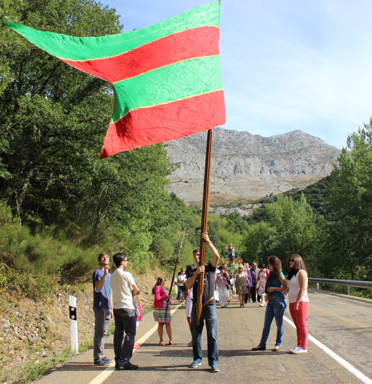 Procesión de la Virgen de Roblo con el pendón de las Salas